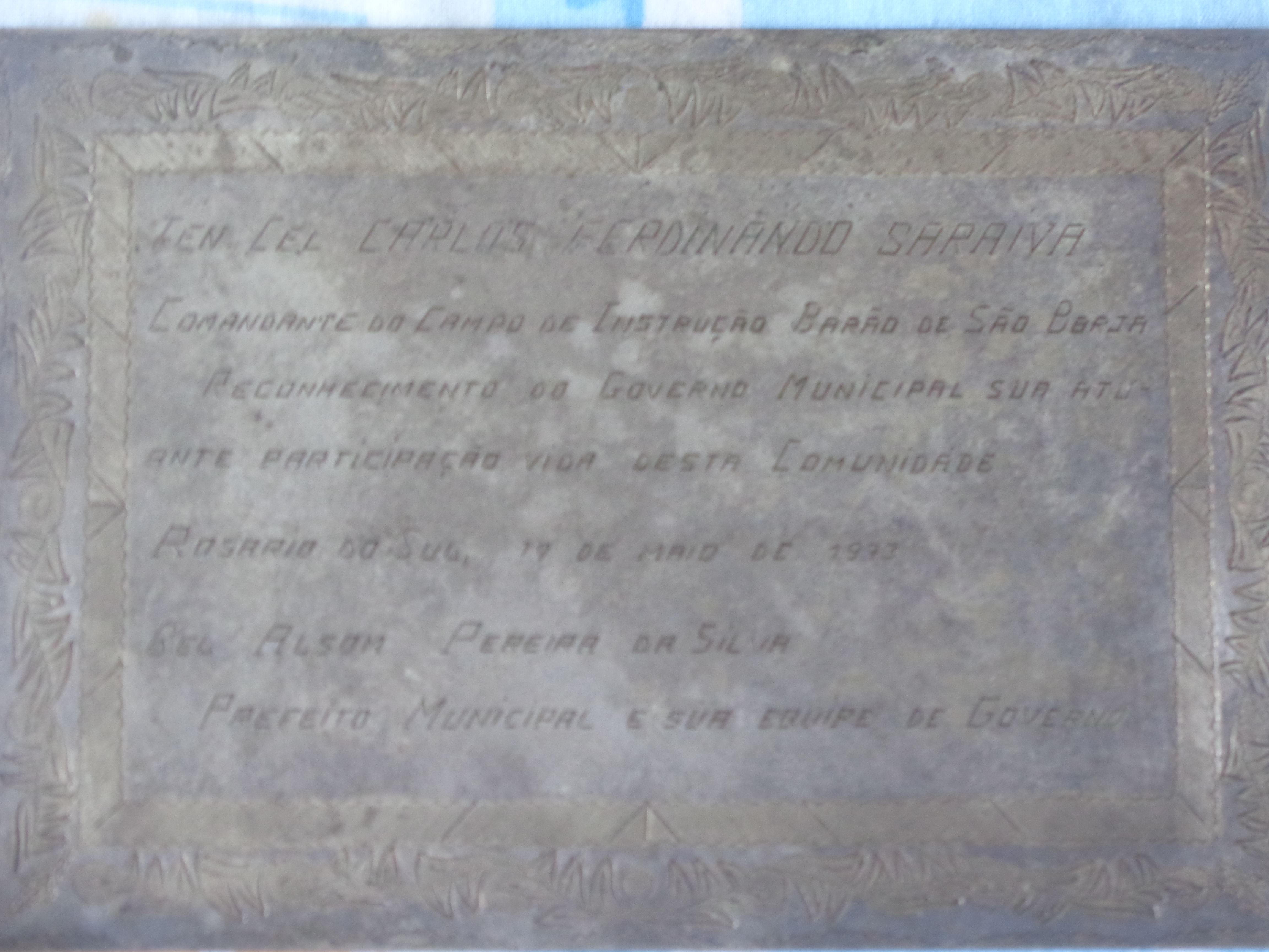 Placa de reconhecimento como Comandante do Campo de Instrução Barão de São Borja